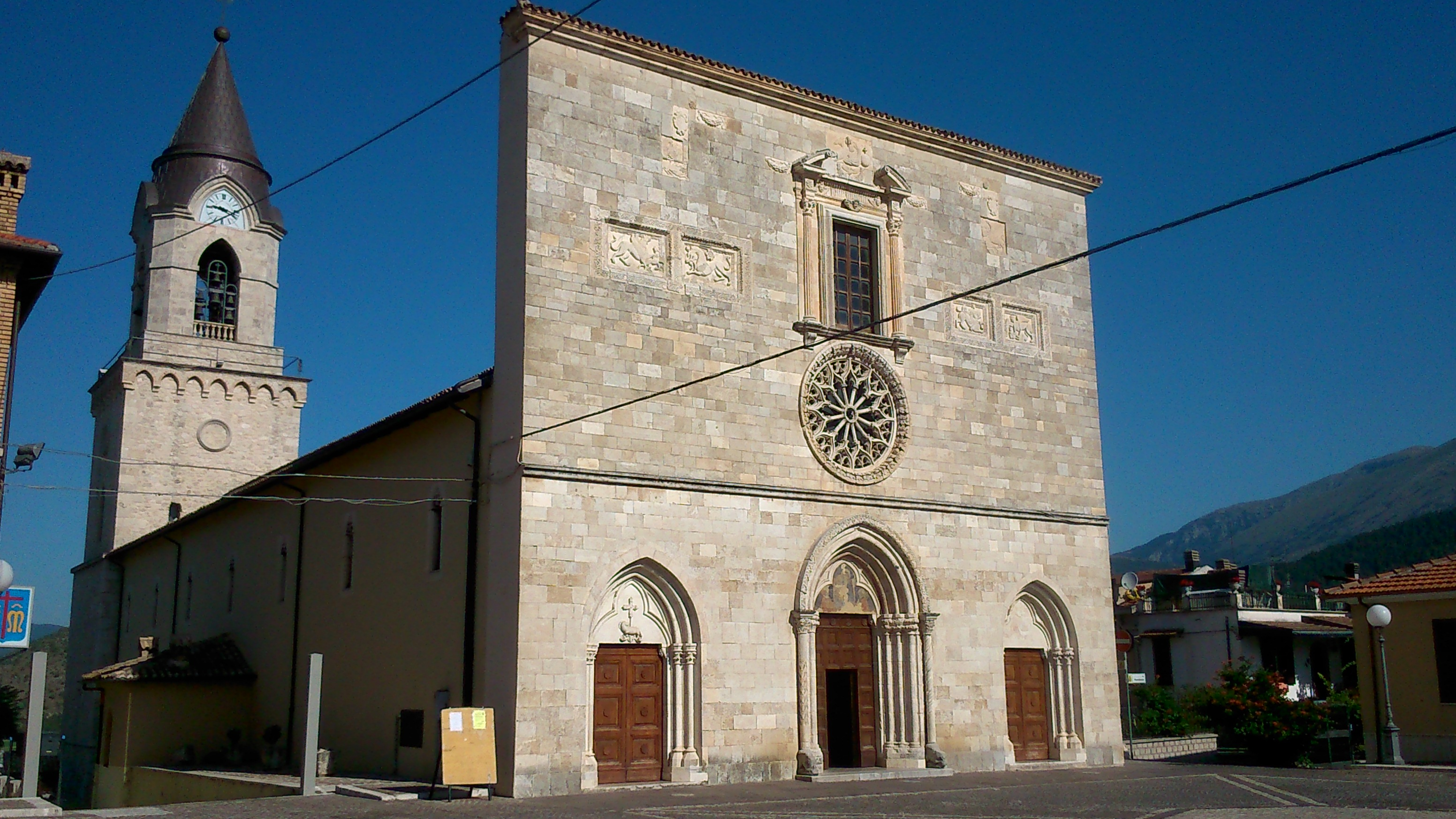 Chiesa di Santa Lucia